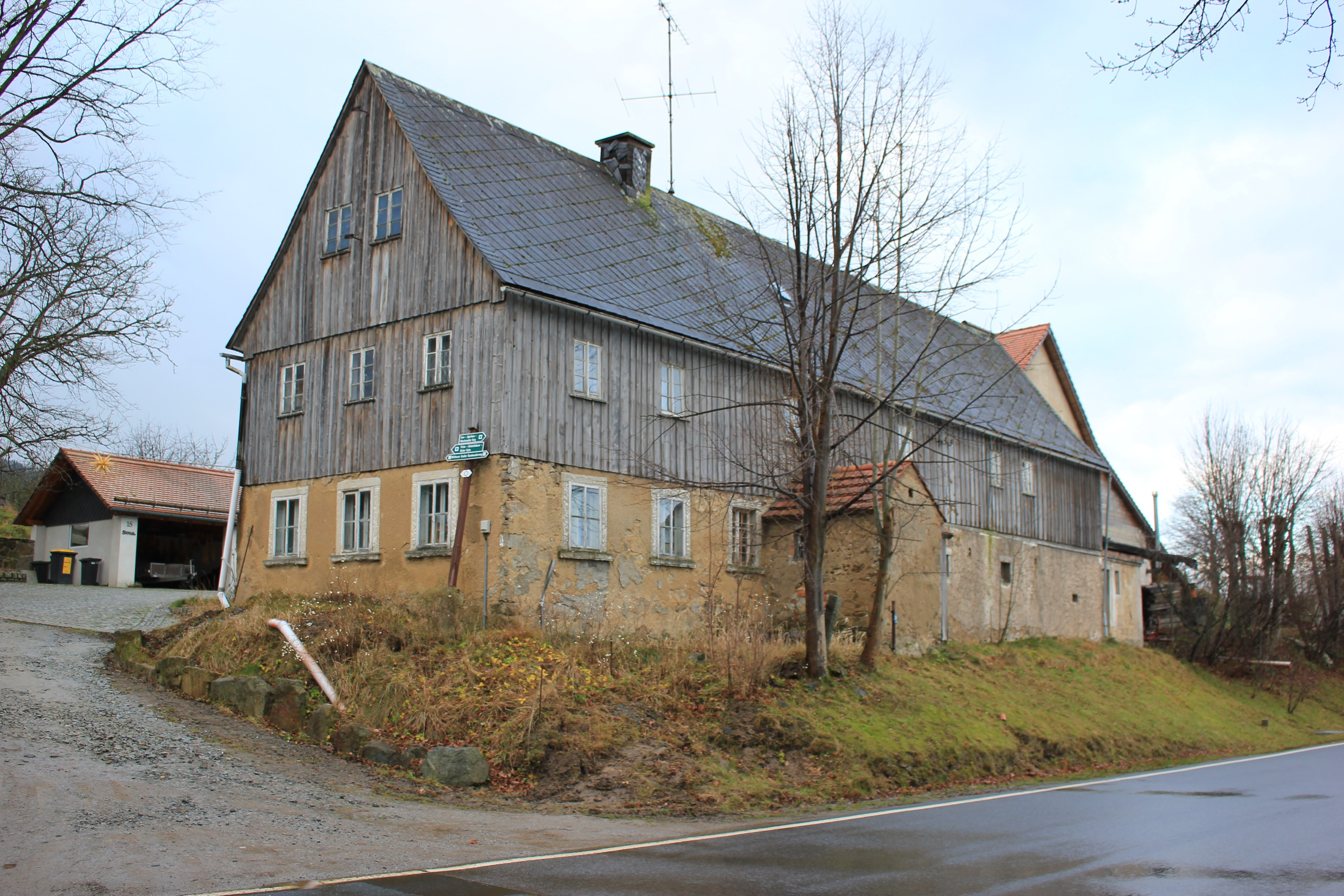 Hornjoserbsce: Chěža na Wjelečanskej, čo. 18 we Warnoćicach, gmejna Dobruša-Huska (kulturny pomnik).